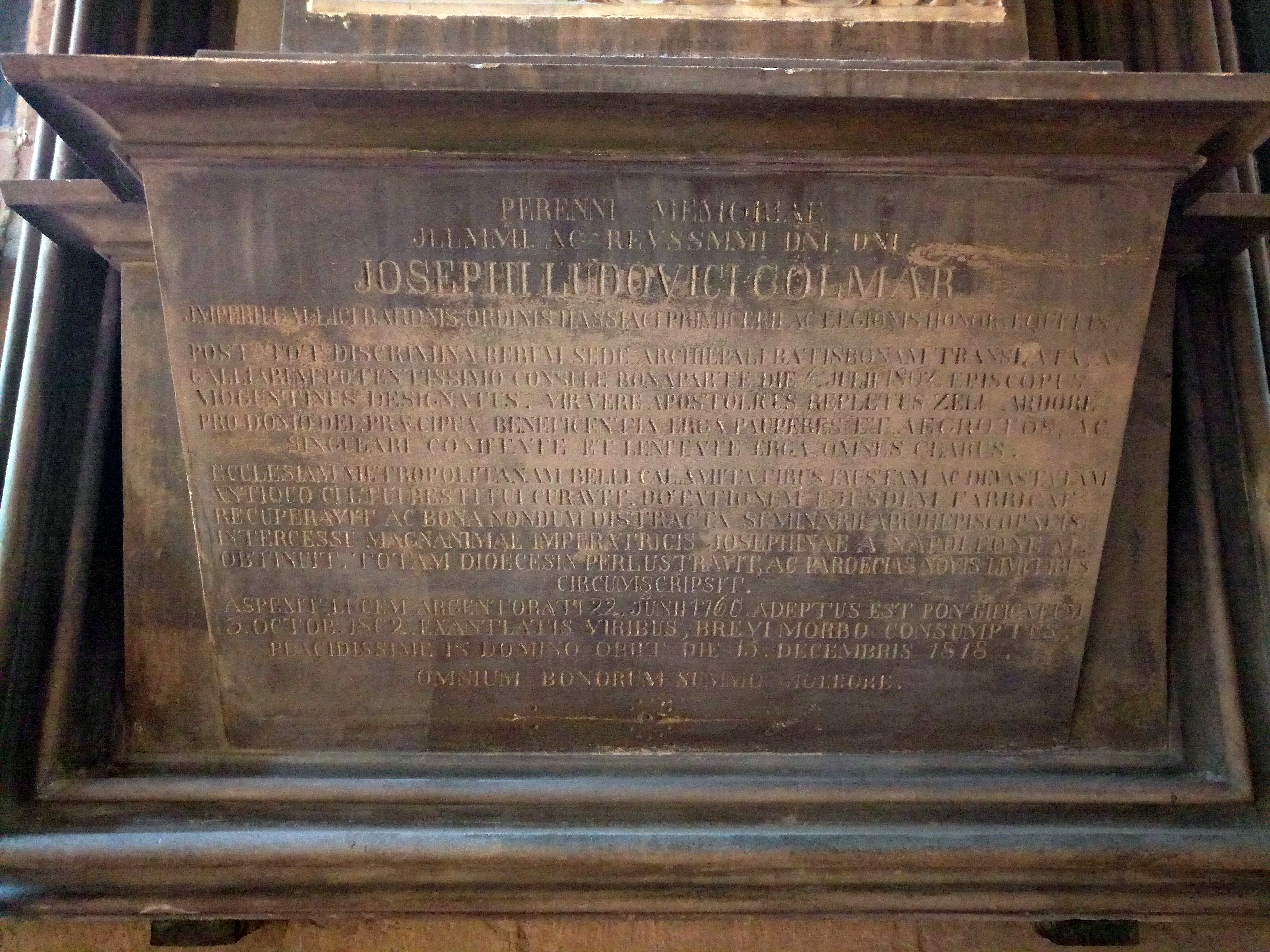 Mainzer Dom, Grabinschrift Bischof Joseph Ludwig Colmar (+ 1818)